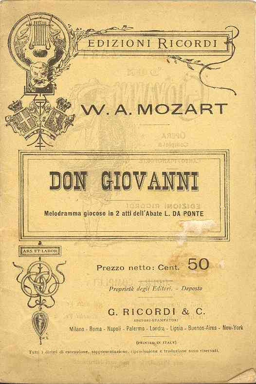 Libretto Don Giovanni melodramma giocoso in due atti dell'Abate L. Da Ponte musica di W.A. Mozart